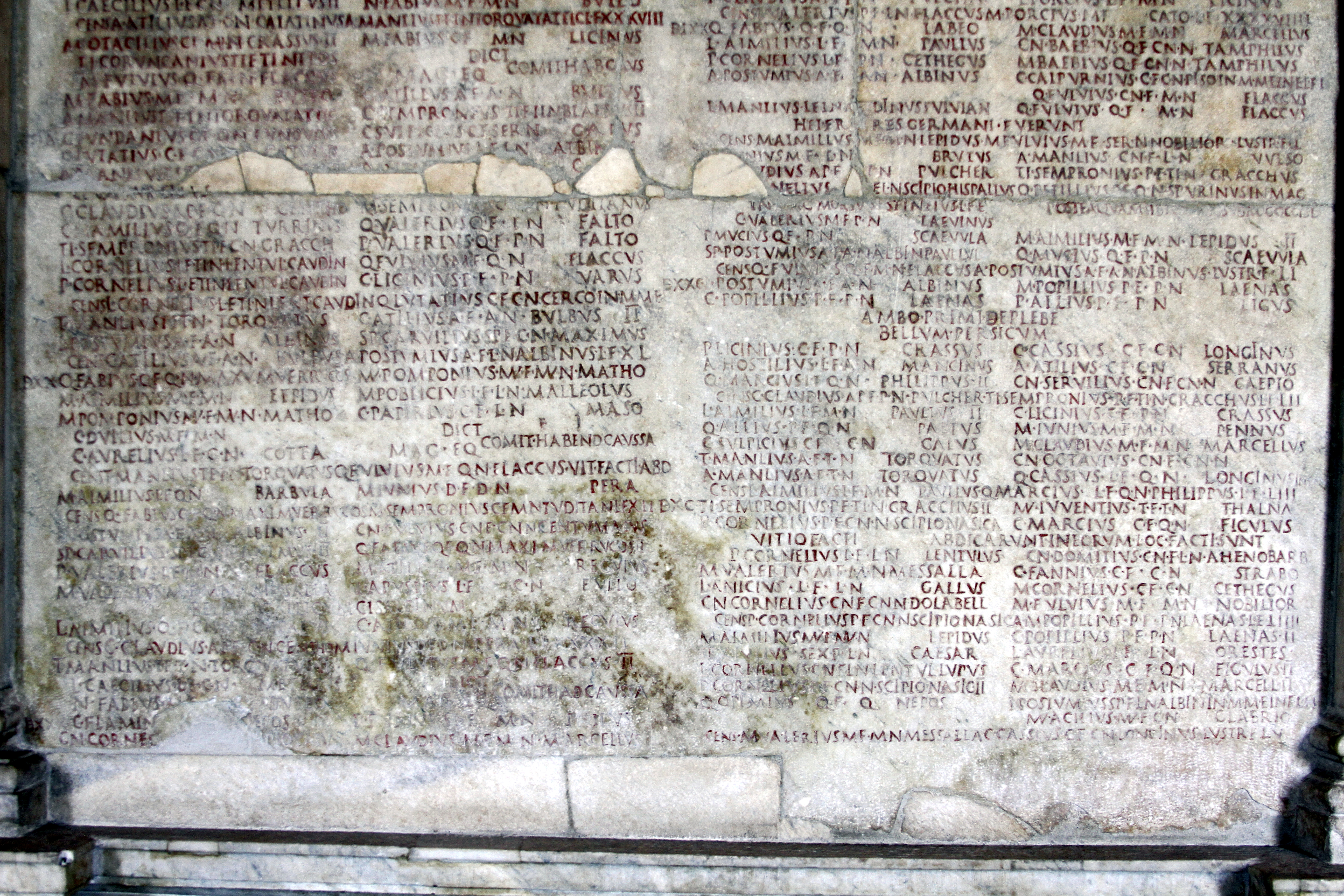 Palazzo dei Conservatori - Musei Capitolini - Rome